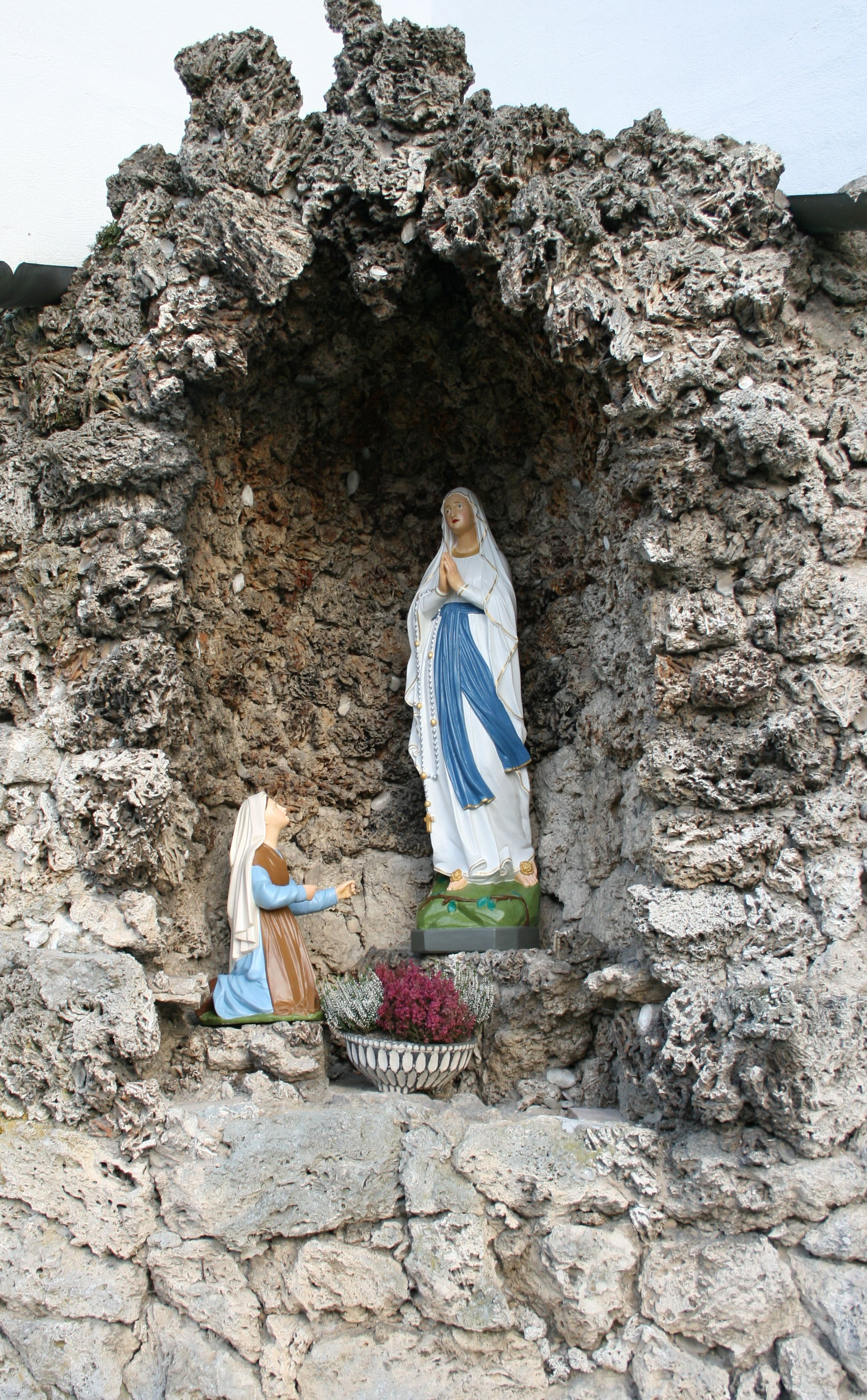 Lourdesgrotte an der katholischen Kirche in Billigheim-Allfeld.